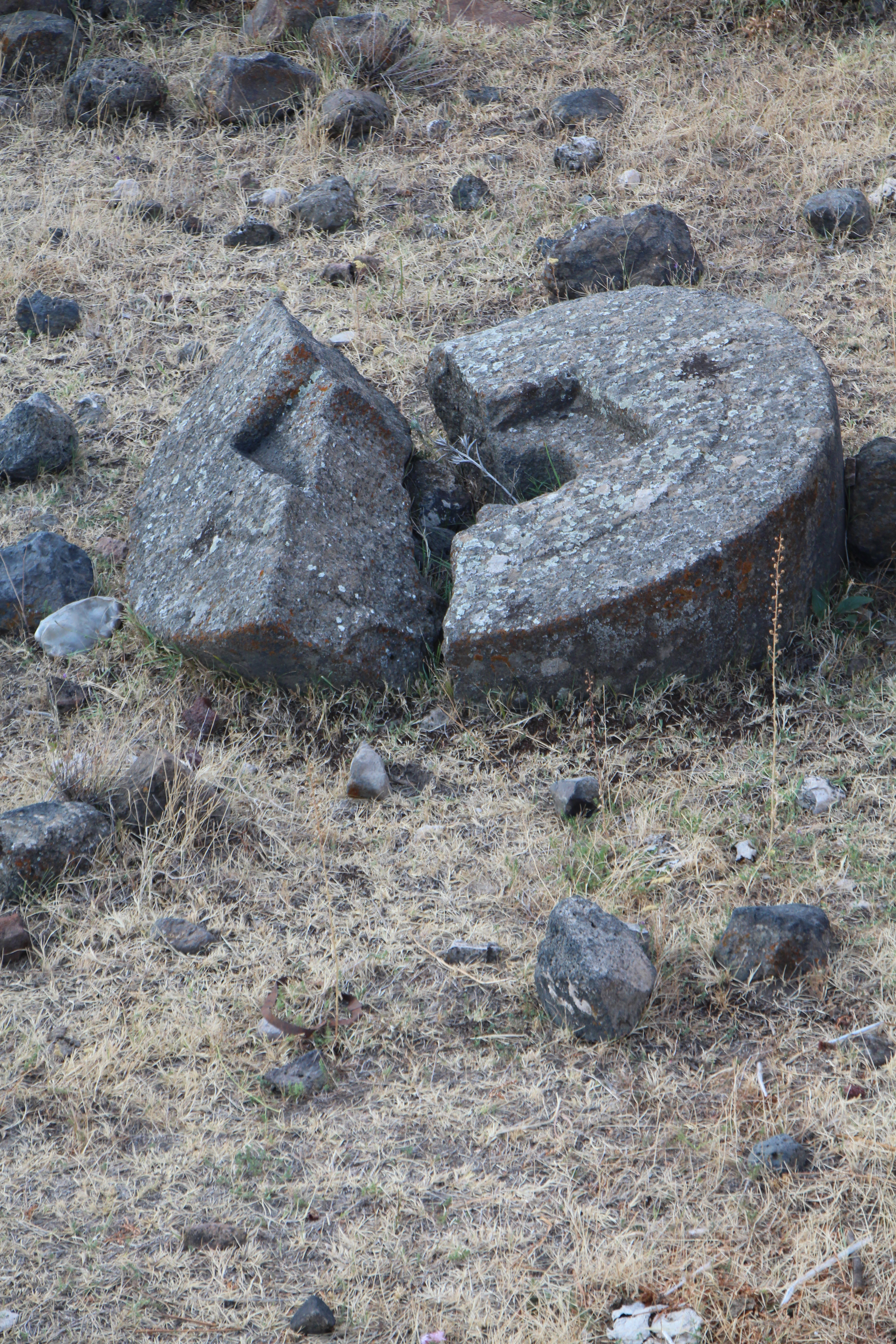 Կոշ, Արագածոտնի մարզ, ձիթհան 18-19 դդ. Ս. Գևորգ եկեղեցու աե կողմում 61/10.3